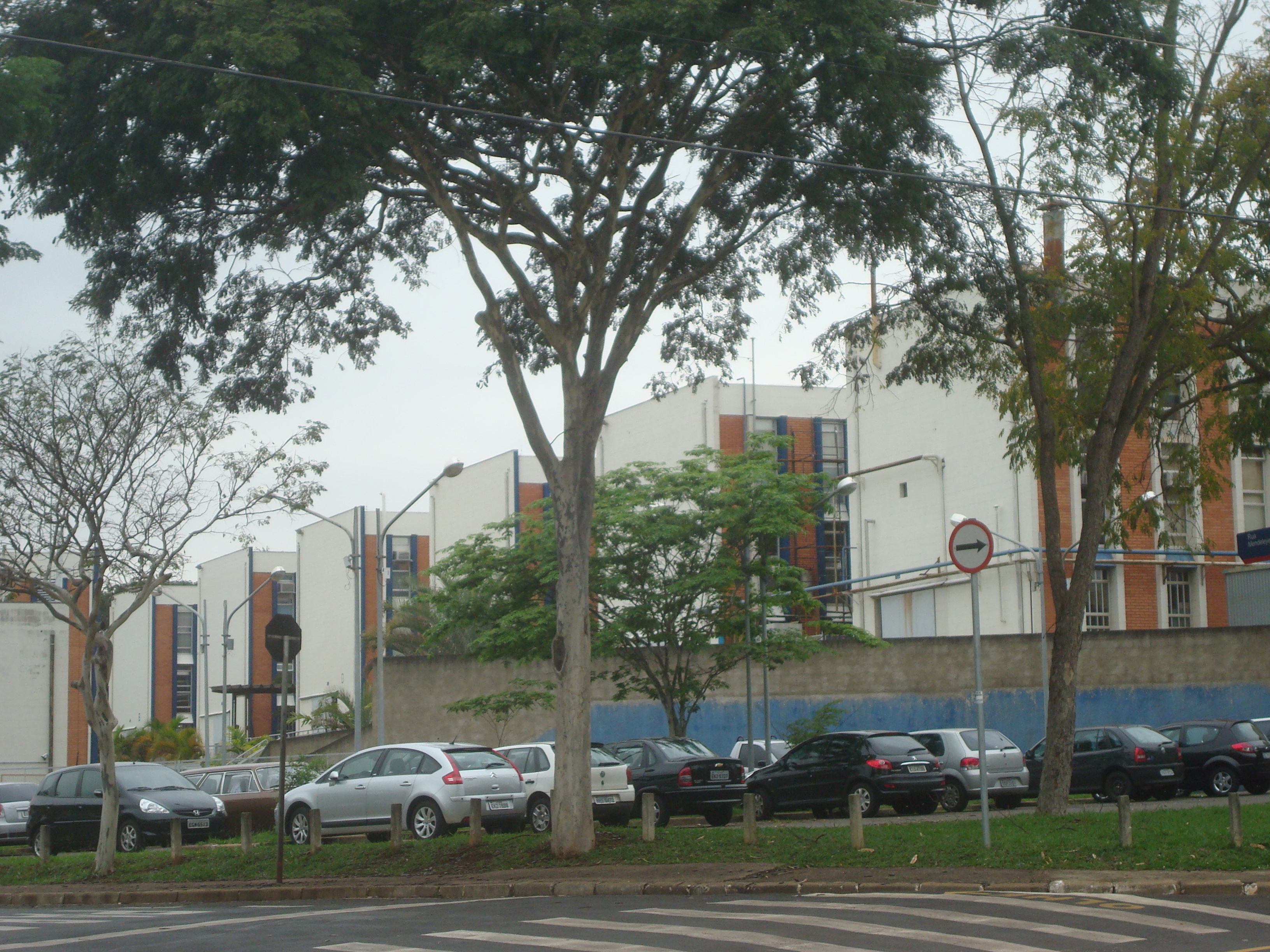 Prédios Eng. Mecânica